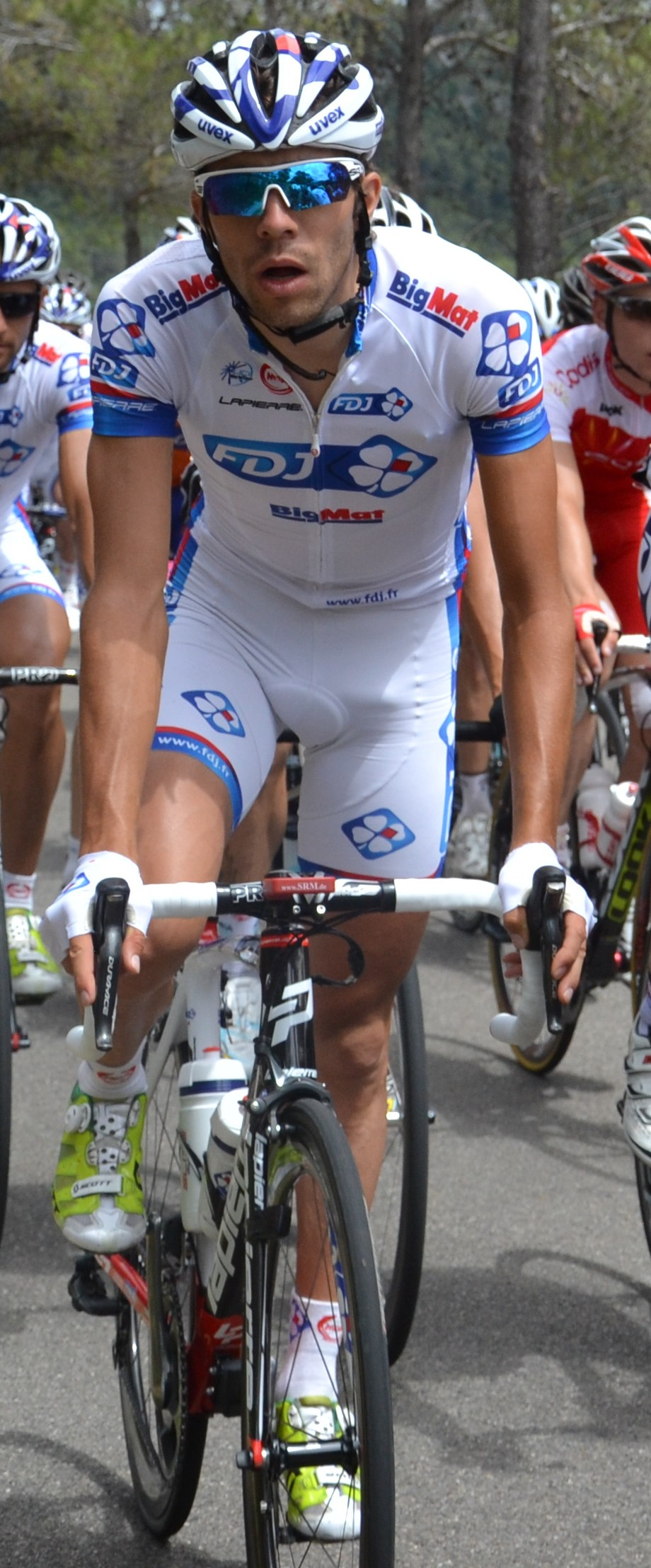 Thibaut Pinot lors de la 13e étape du Tour de France 2012.